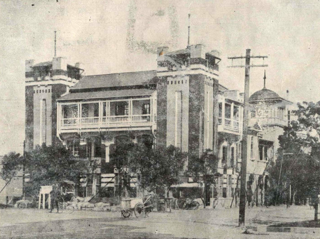 中文（台灣）: 位於北門町的三井物產株式會社臺北支店